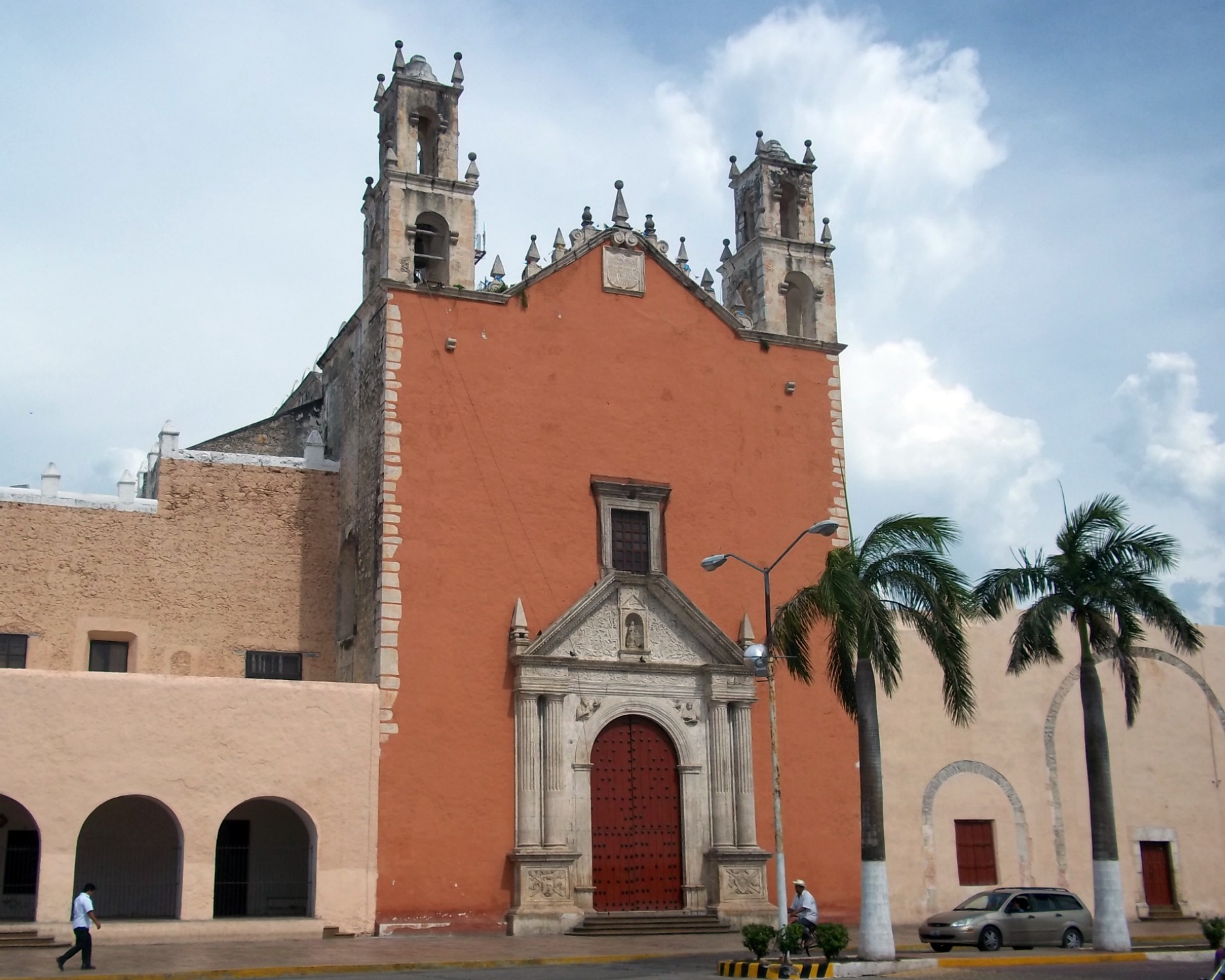 Iglesia de San Juan Bautista en Motul, Yucatán.